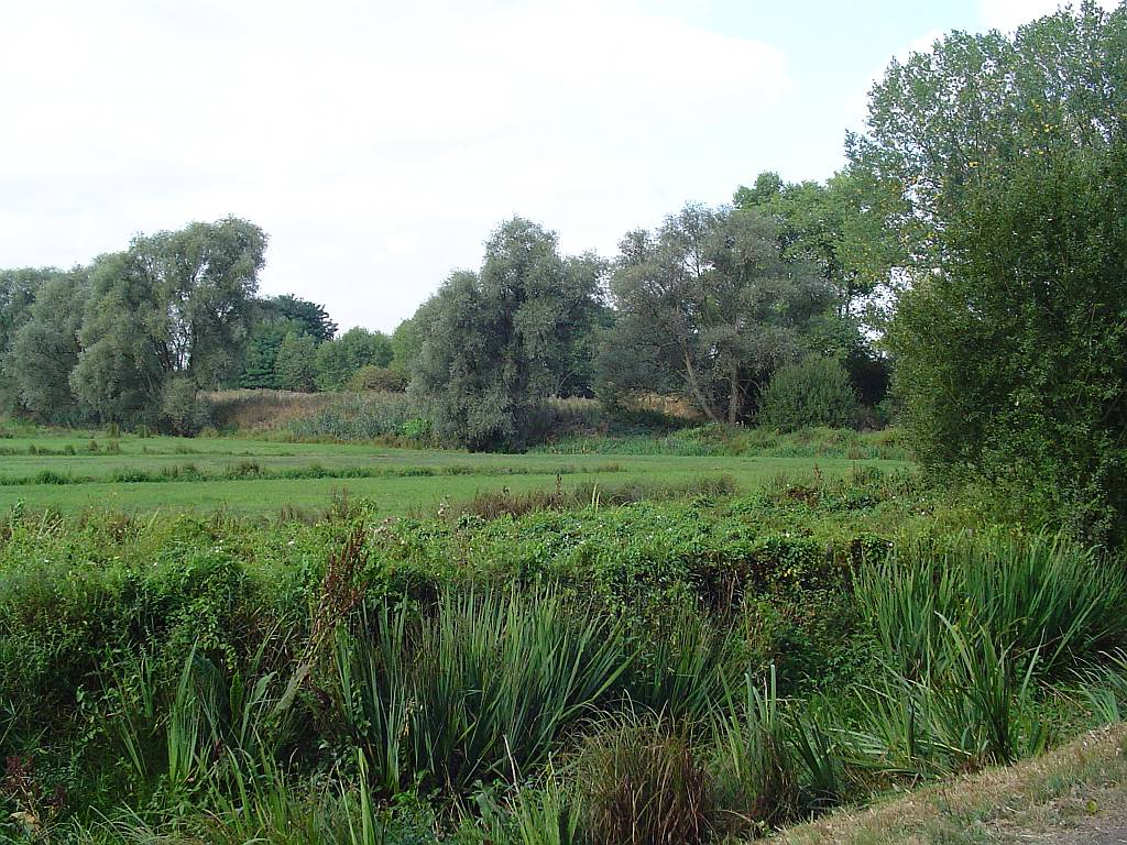 Natuurreservaat Bourgoyen-Ossemeersen nabij Gent